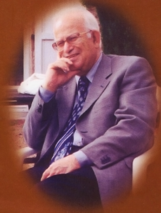 دکتر مهدی سمسار (1307-1383) روزنامه‌نگار پیشکسوت ایرانی